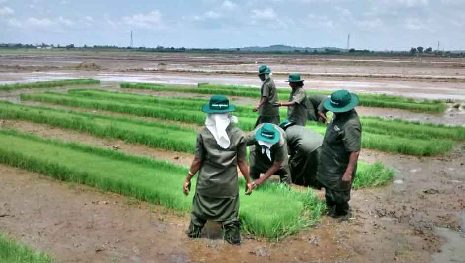 പായഞാറ്റടി